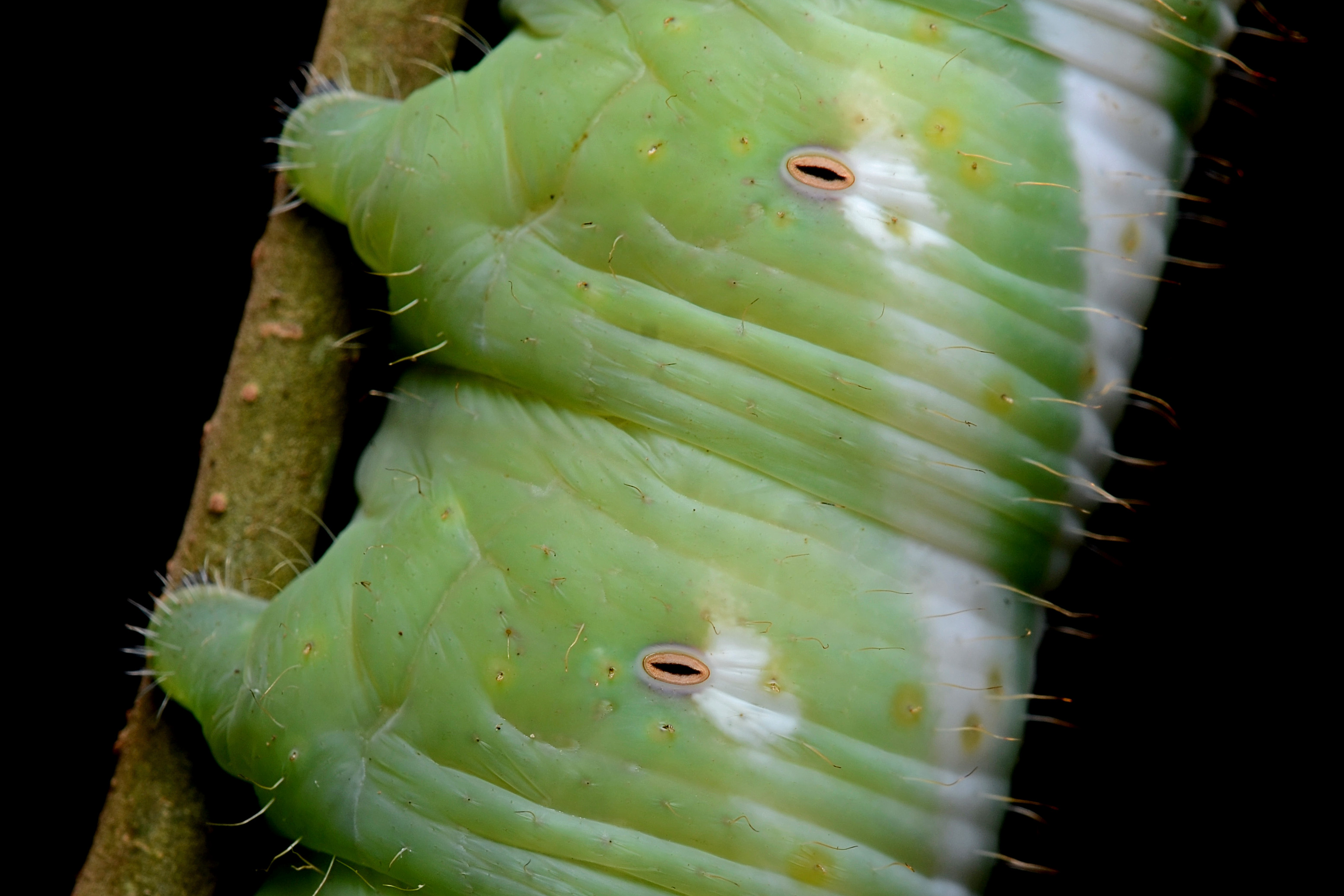 Sphingidae